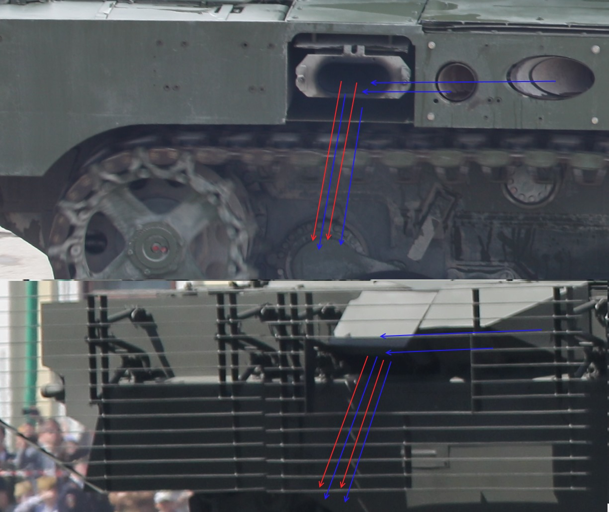 Система смешения выхлопа с холодным воздухом